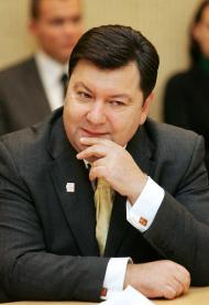 Депутат Сейма Литвы Эмануэлис Зингерис